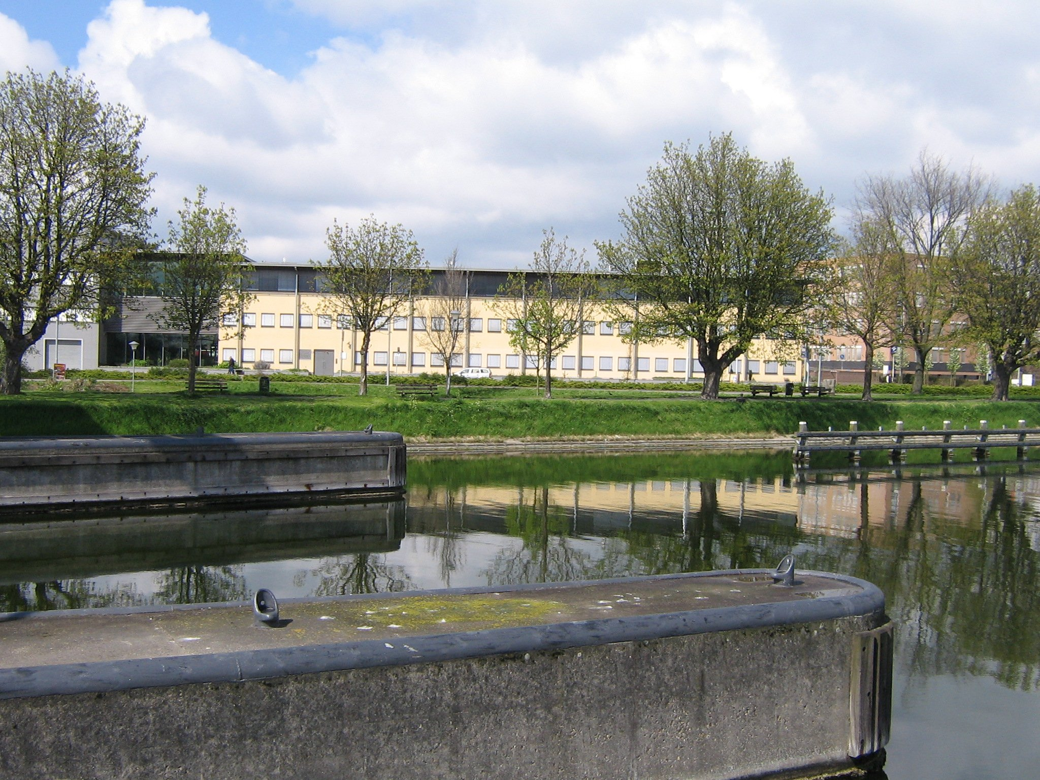 Middelburg: De Blauwe Dijk met de Arrondissementsrechtbank over het Kanaal door Walcheren.